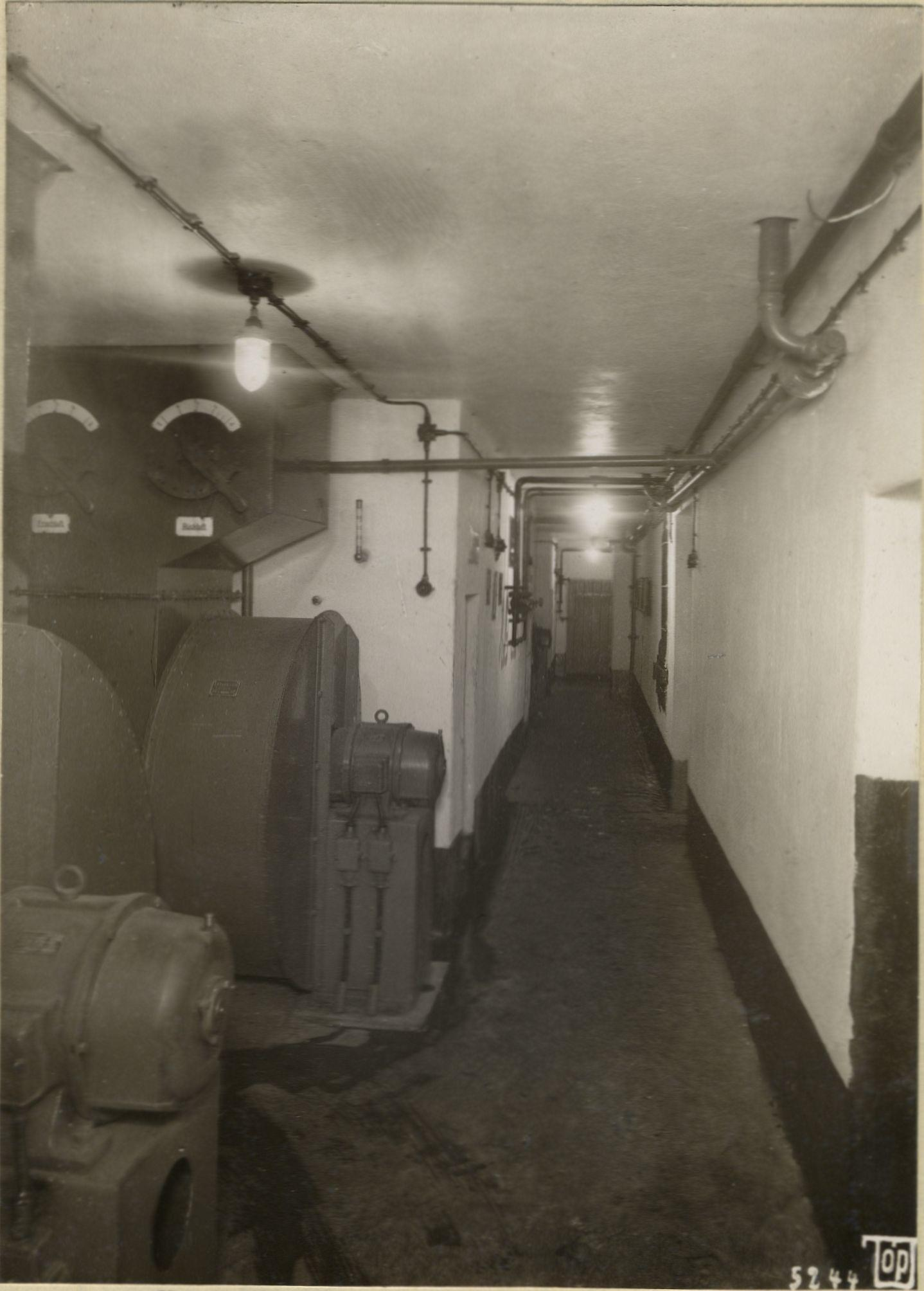 Bildbeschriftung: Ventilationsraum zu den unteren Kasten Nr. 5-8 [maschinenschriftlich]. Zitierweise: Landesarchiv Thüringen – Hauptstaatsarchiv Weimar, J. A. Topf & Söhne Nr. 311, Bl. 42r Alte Archivsignatur: 5244 TopF Laufzeit: [zwischen 1926 - 1931] Text im Bild: [Schild unter den Reglern:] Frischluft, Rückluft. Format: Hochformat 170 x 120 Beschreibung: Innenansicht, 2 Gebläse in einem Kellergang, bestehend aus Elektromotor und Gehäuse, sowie einem Regeler für Frischluft und Rückluft, Rohrleitungen mit Handrädern im Gang.